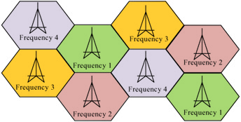 Resuso de frecuencias en una red de celdas